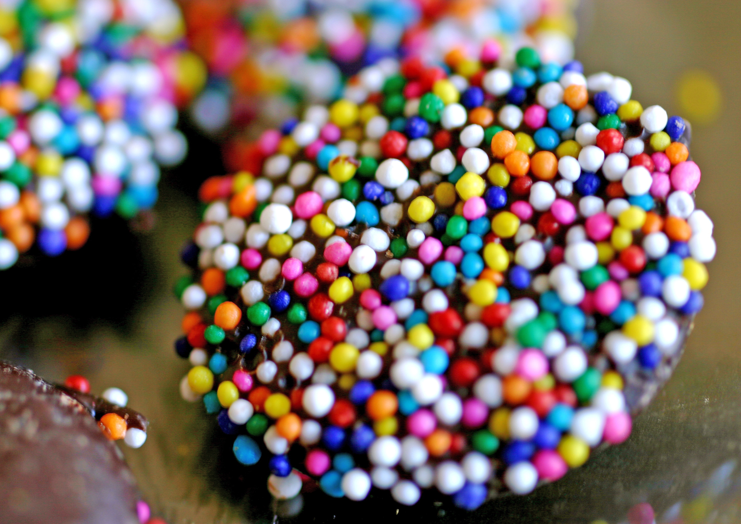 Nonpareils